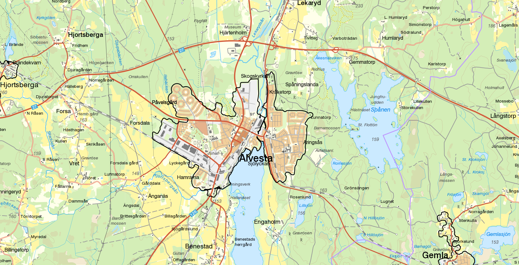 Tätorten Alvesta med gränserna från Statistiska centralbyråns tätortsavgränsning 2015 i svart. Bakgrundskarta från Lantmäteriet, skala 1:30 236.